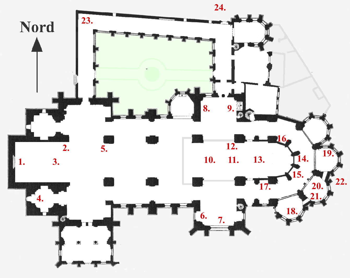 erstellt nach Vorlage des Grundrisses auf Artikelseite, mit Veränderungen. Zahlen eingefügt für Ausstattungsgegenstände